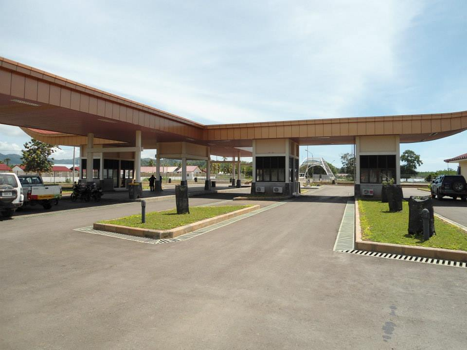 Posto de Fronteira de Batugade